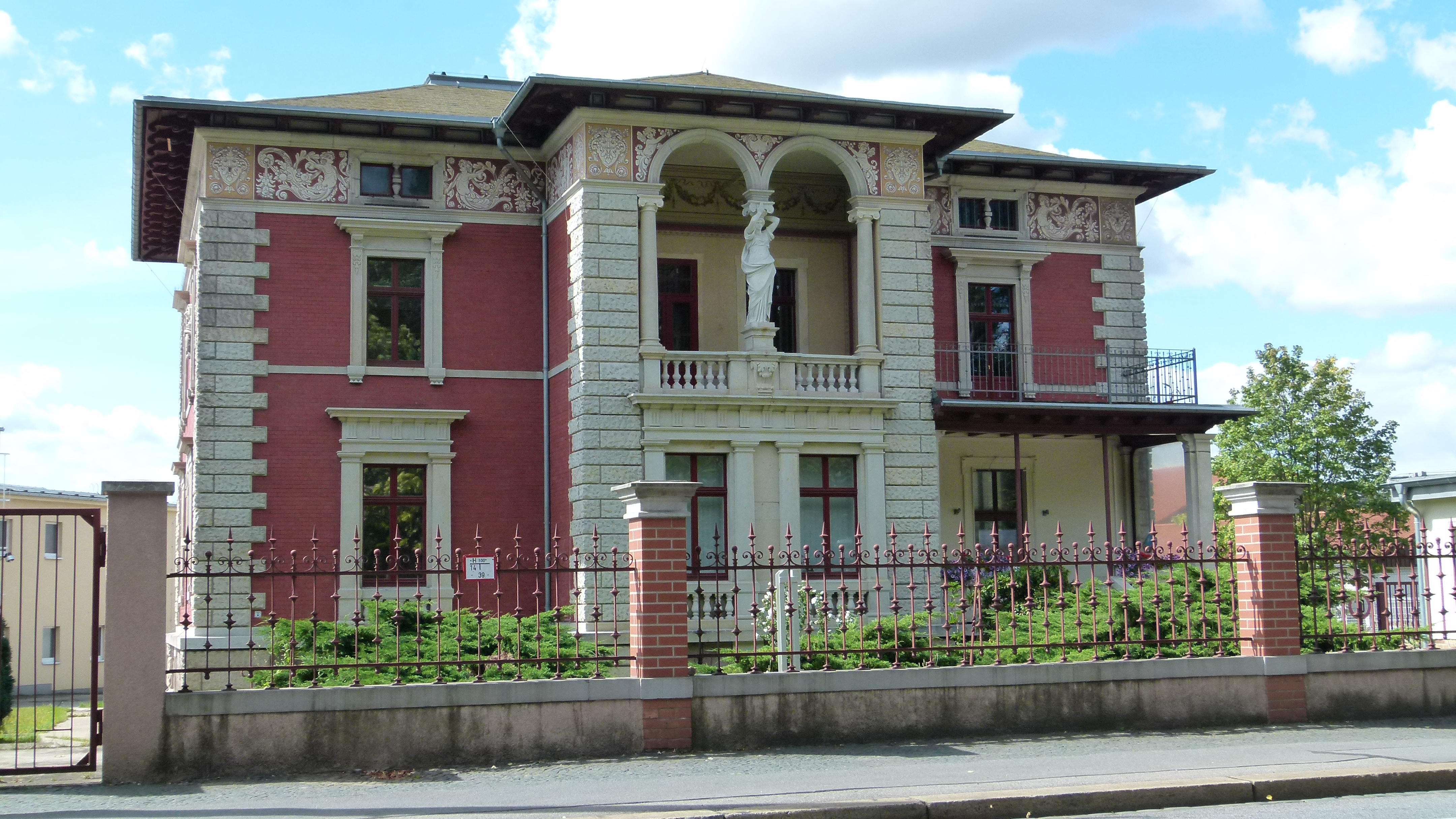 Denkmalgeschütztes Haus, Meißner Straße 47, Radebeul, Sachsen